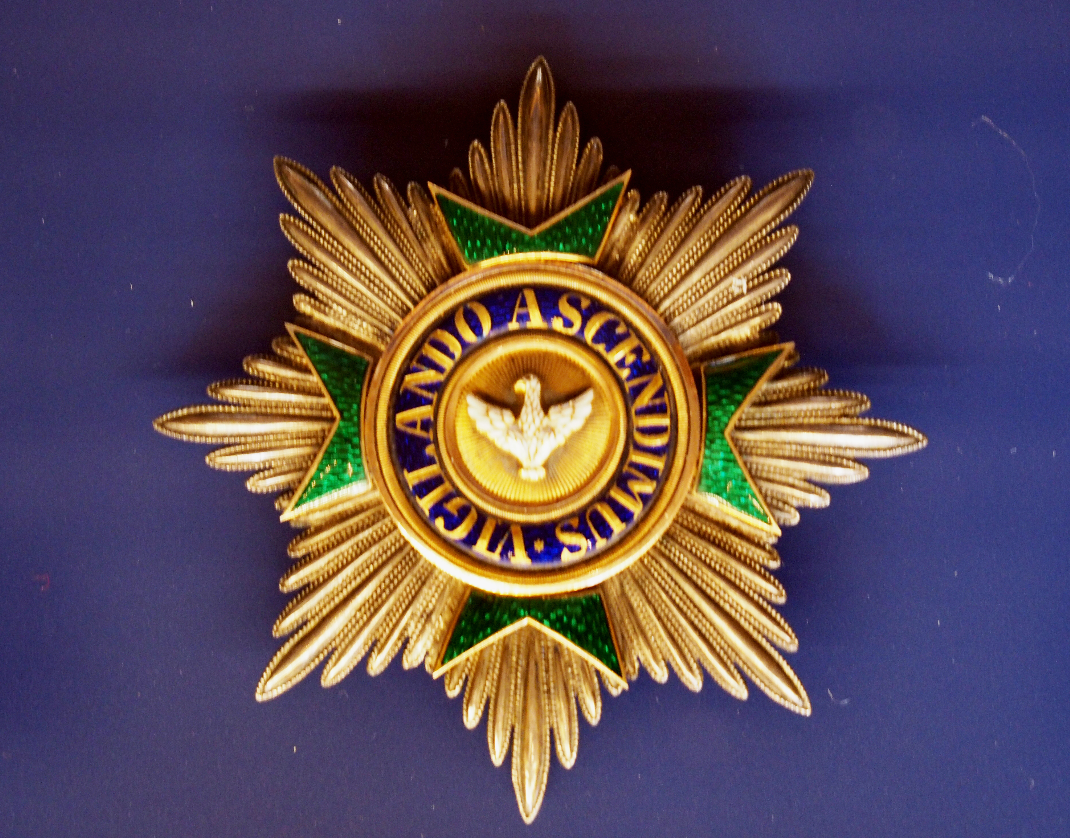 Bruststern zum Großkreuz des Sachsen-Weimarschen Hausordens der Wachsamkeit, auch Hausorden vom Weißen Falken, 1816 von Großherzog Carl August an Goethe verliehen